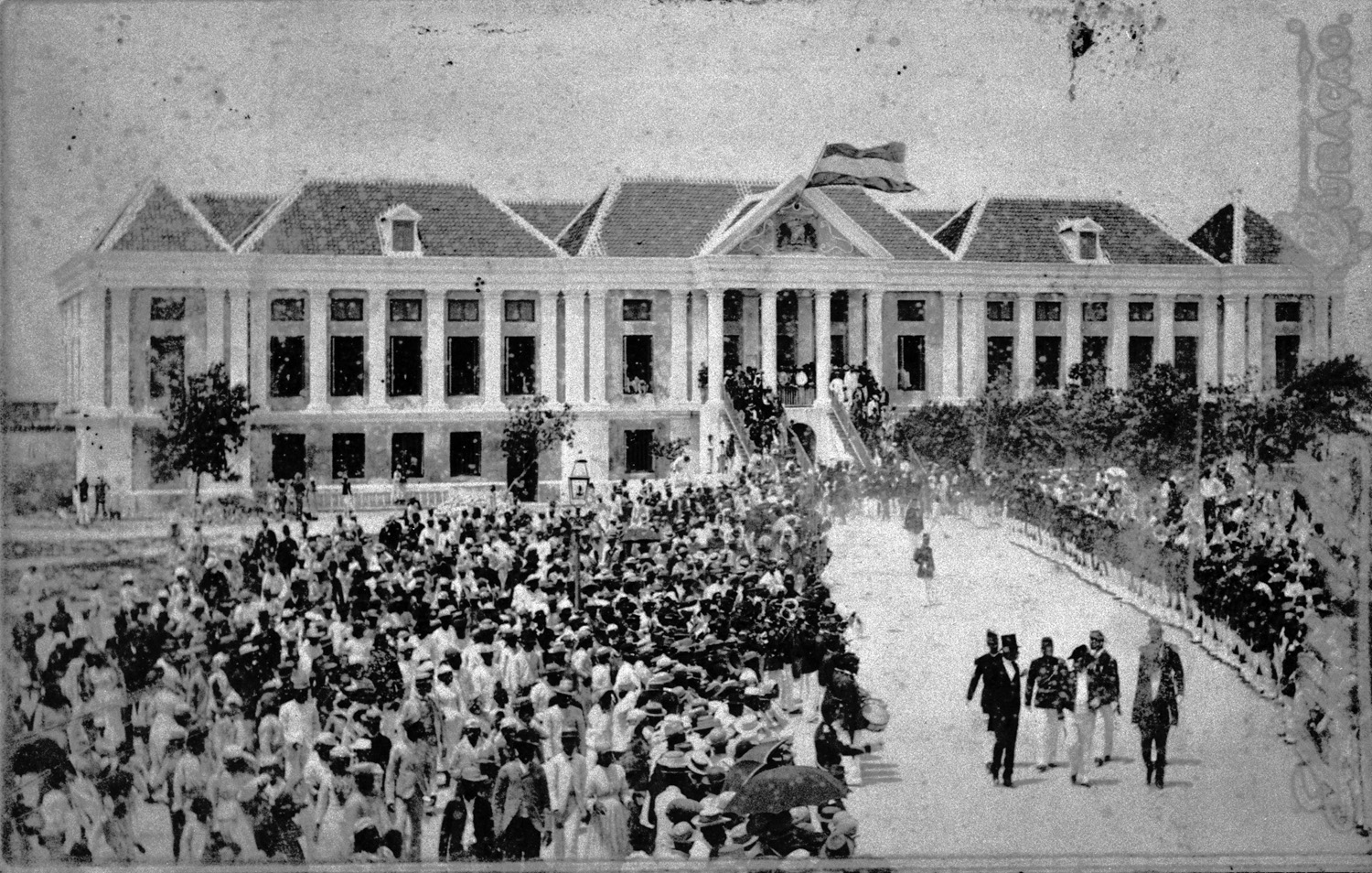 Kabinetfoto.